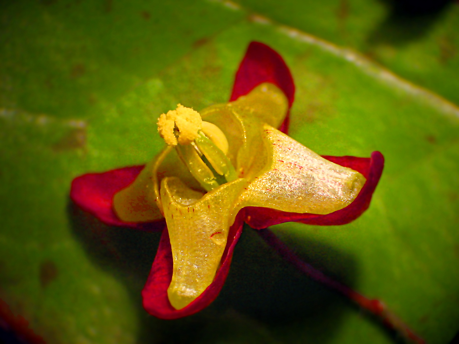 Epimedium alpinum under 10x magnification